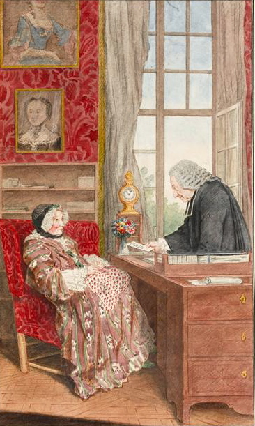 Madame Doublet et monsieur son frère l'abbé Le Gendre, conseiller de grand 'chambre